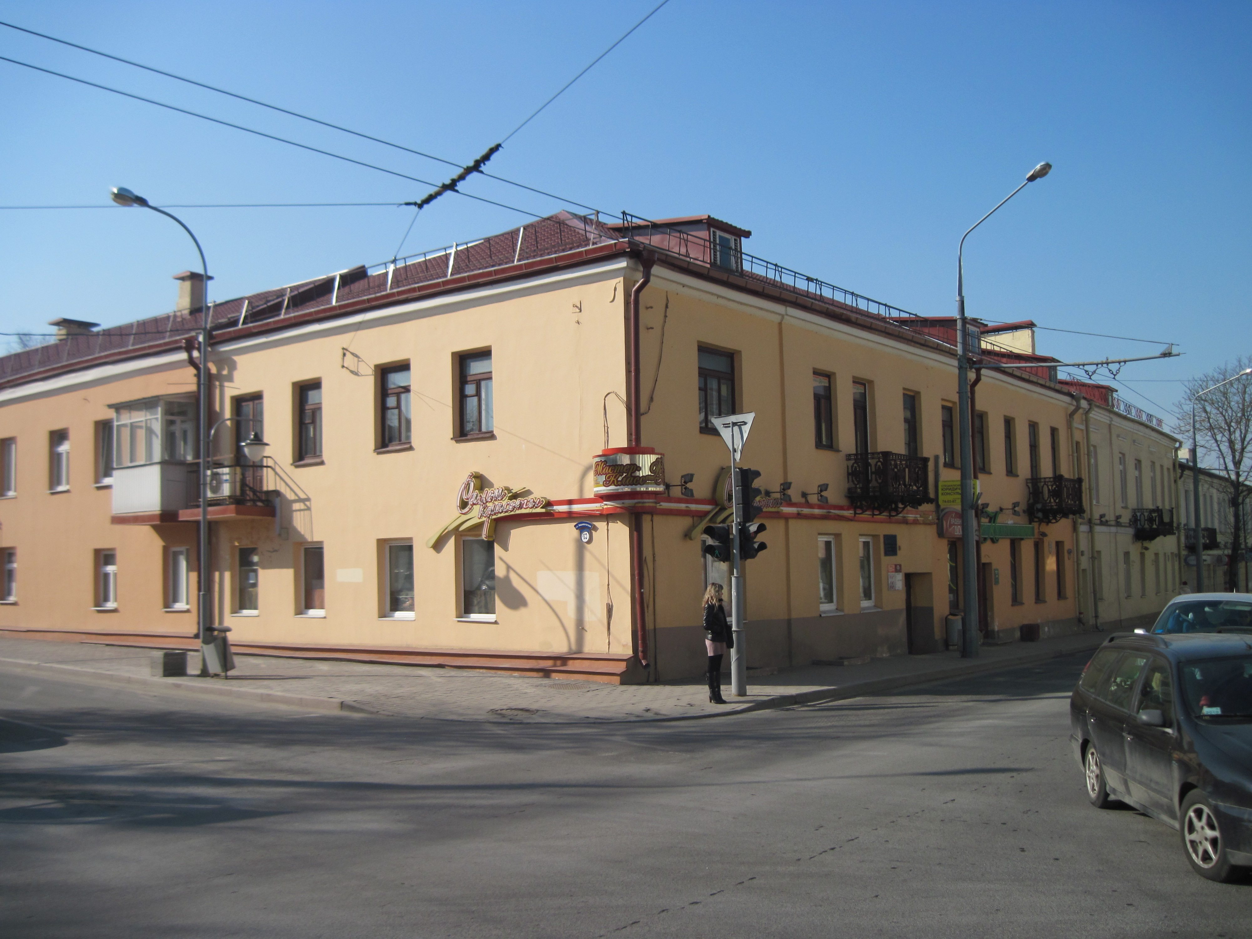 Забудова гістарычнага цэнтра Гродна. Вуліца К. Маркса, 15